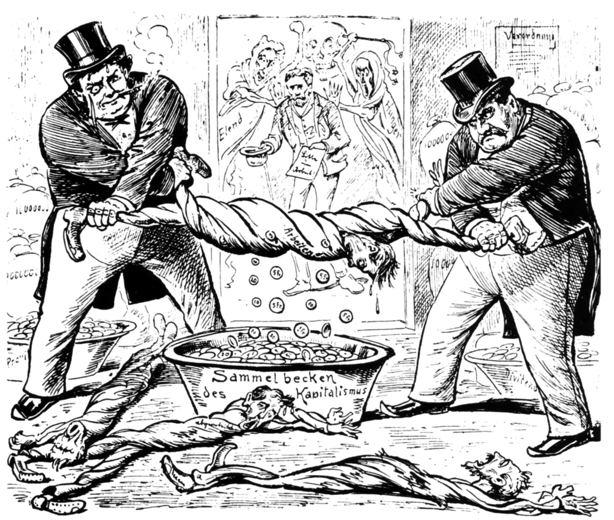 «Das neue Verhältnis zwischen Arbeiter und Unternehmer». Karikatur aus dem «Neuen Postillon», Zürich, Schweiz 1896.